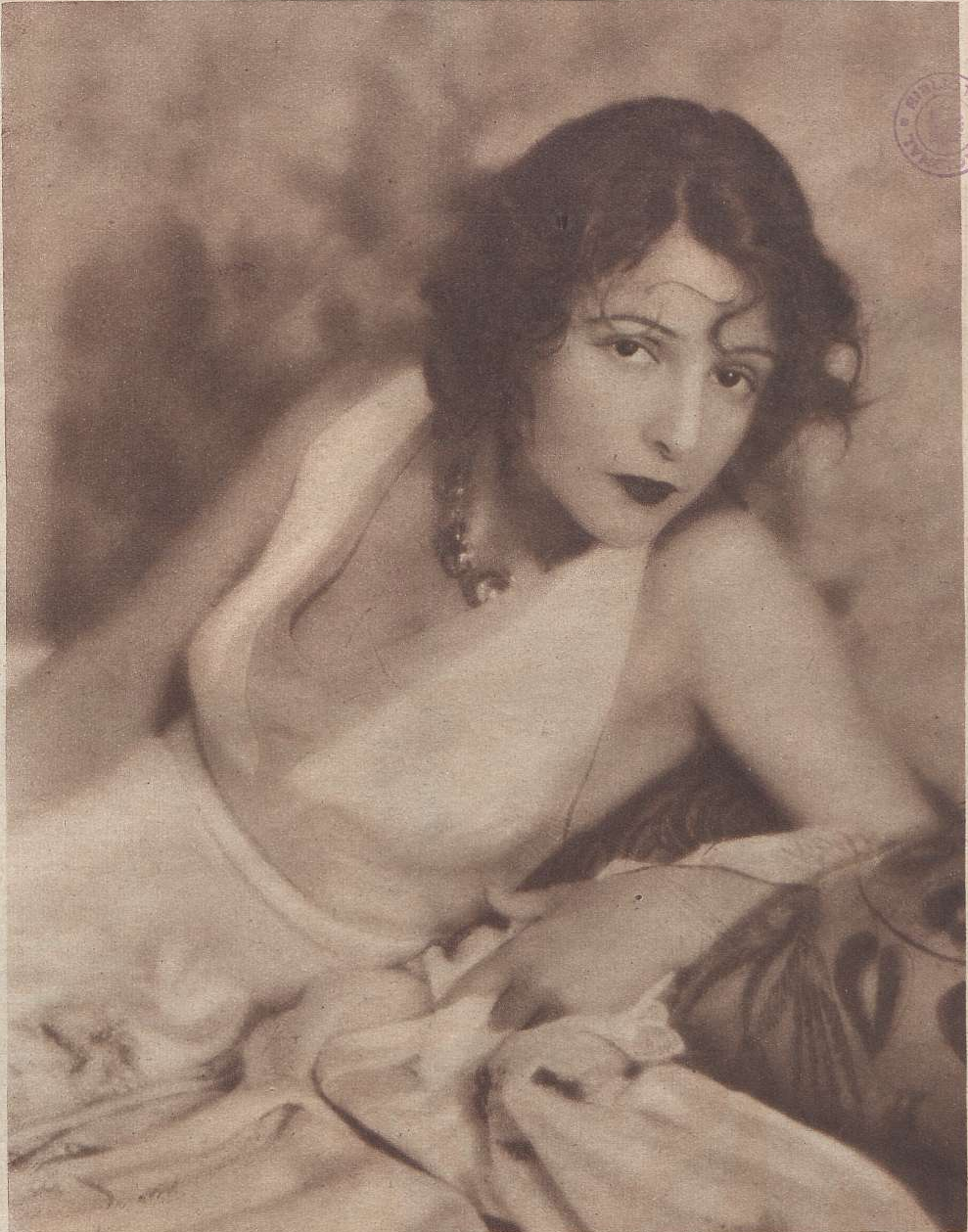 Descripción original de la revista: "Norma Talmadge, la célebre estrella cinematográfica, cuñada de Buster Keaton, que acompaña á este último y á su esposa, así como á Luis Alonso, en su excursión por España."